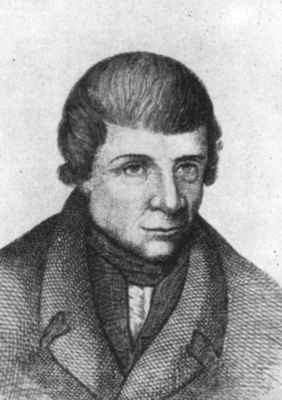 Bonaventura Furlanetto (1738-1817), Bruxelles, Bibl. Royale